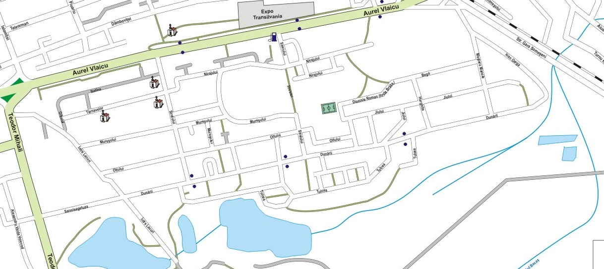 Harta cartierului Intre Lacuri, Cluj-Napoca